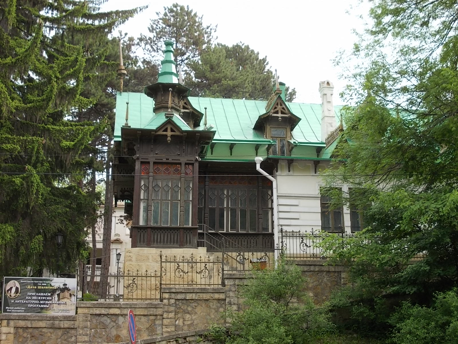 Cottage_Chaliapin_in_Kislovodsk (Дача Шаляпина в Кисловодске)